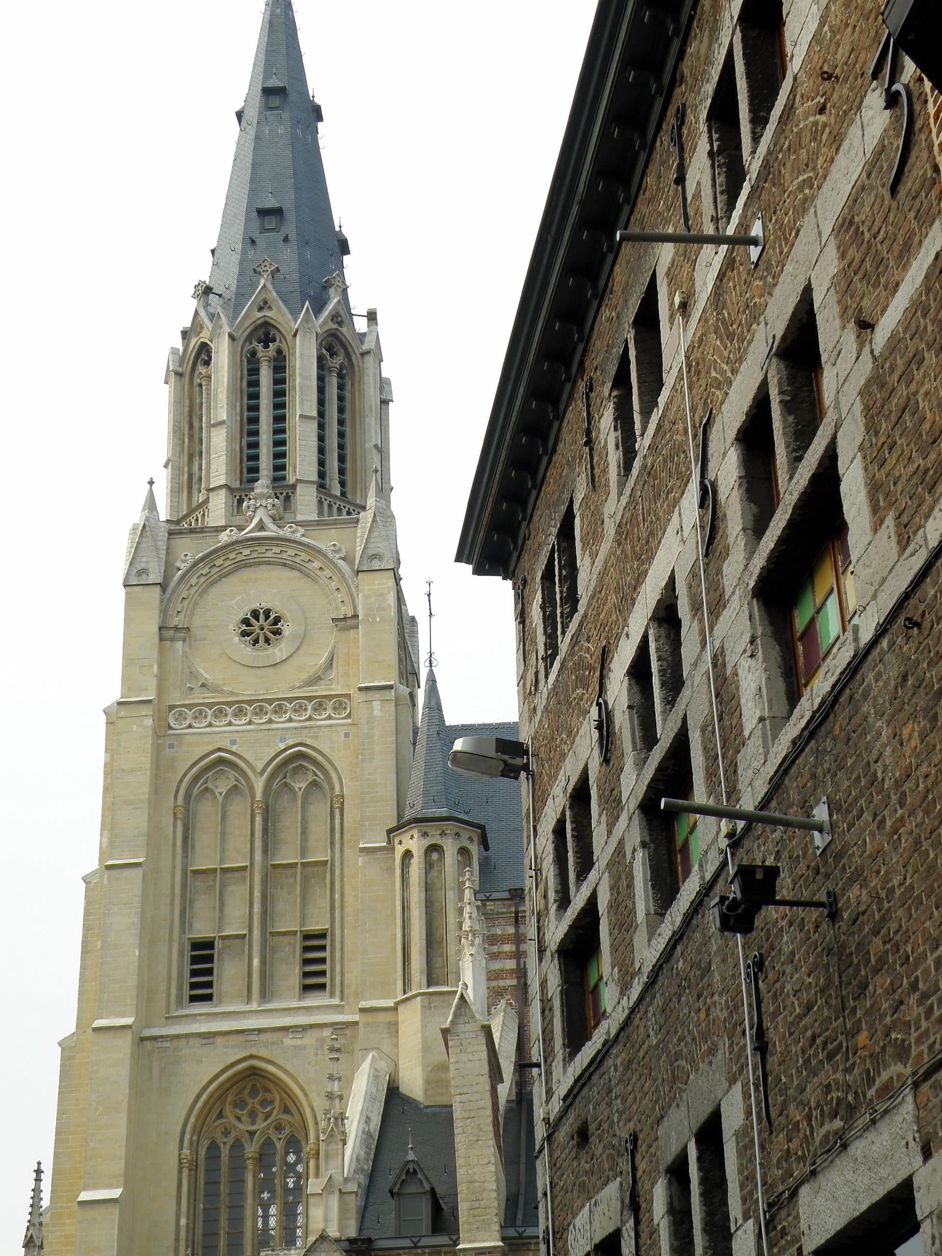 Saint-Trond (en néerl. Sint-Truiden, prov. de Limbourg, Belgique). Vue de la Luikerstraat : à gauche clocher néogothique de l'église Notre-Dame (Onze-Lieve-Vrouwekerk), à droite façade latérale de la maison sise à l'angle Luikerstraat/Heilig-Hartplein, datant de 1653.